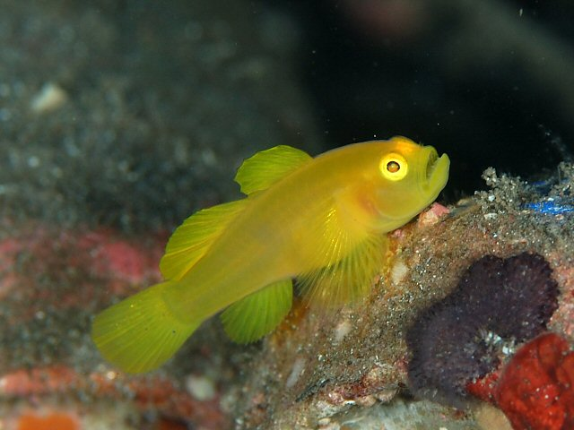 ミジンベニハゼ Lubricogobius exiguus